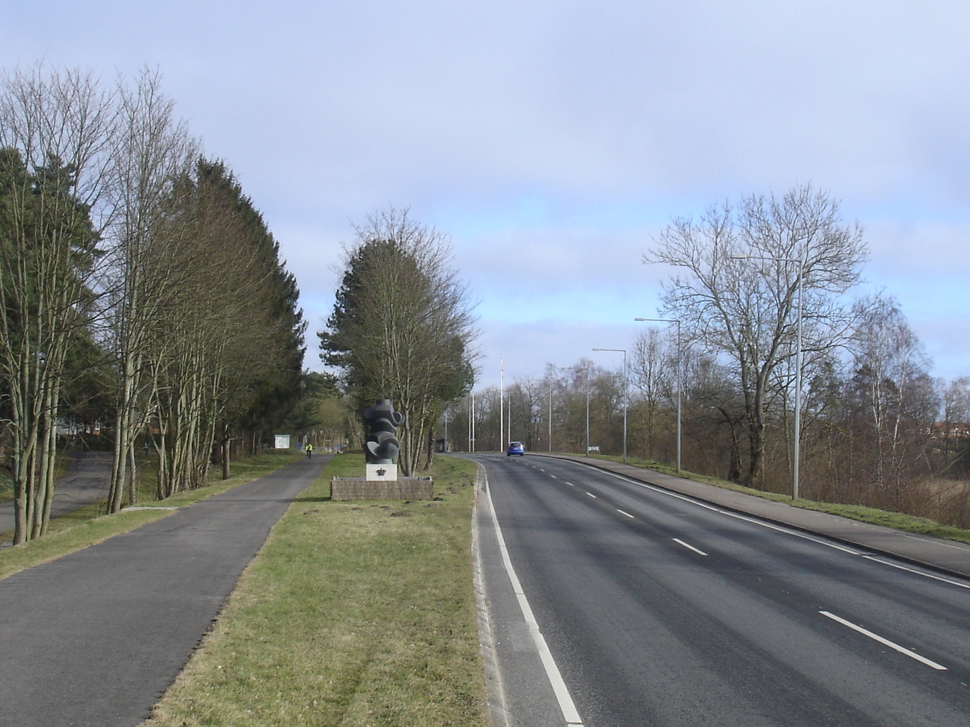 Indkørslen til Strib ad Gl. Strandvej med Prinsgemalens skulptur